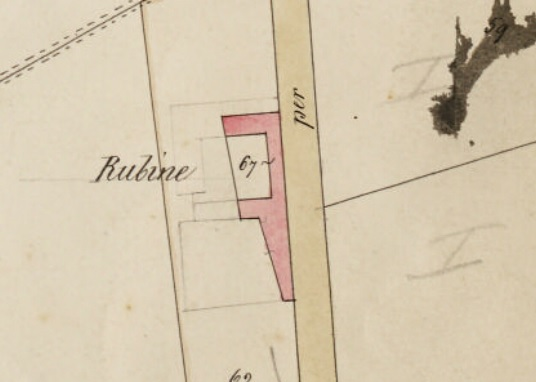 Particolare di una mappa catastale